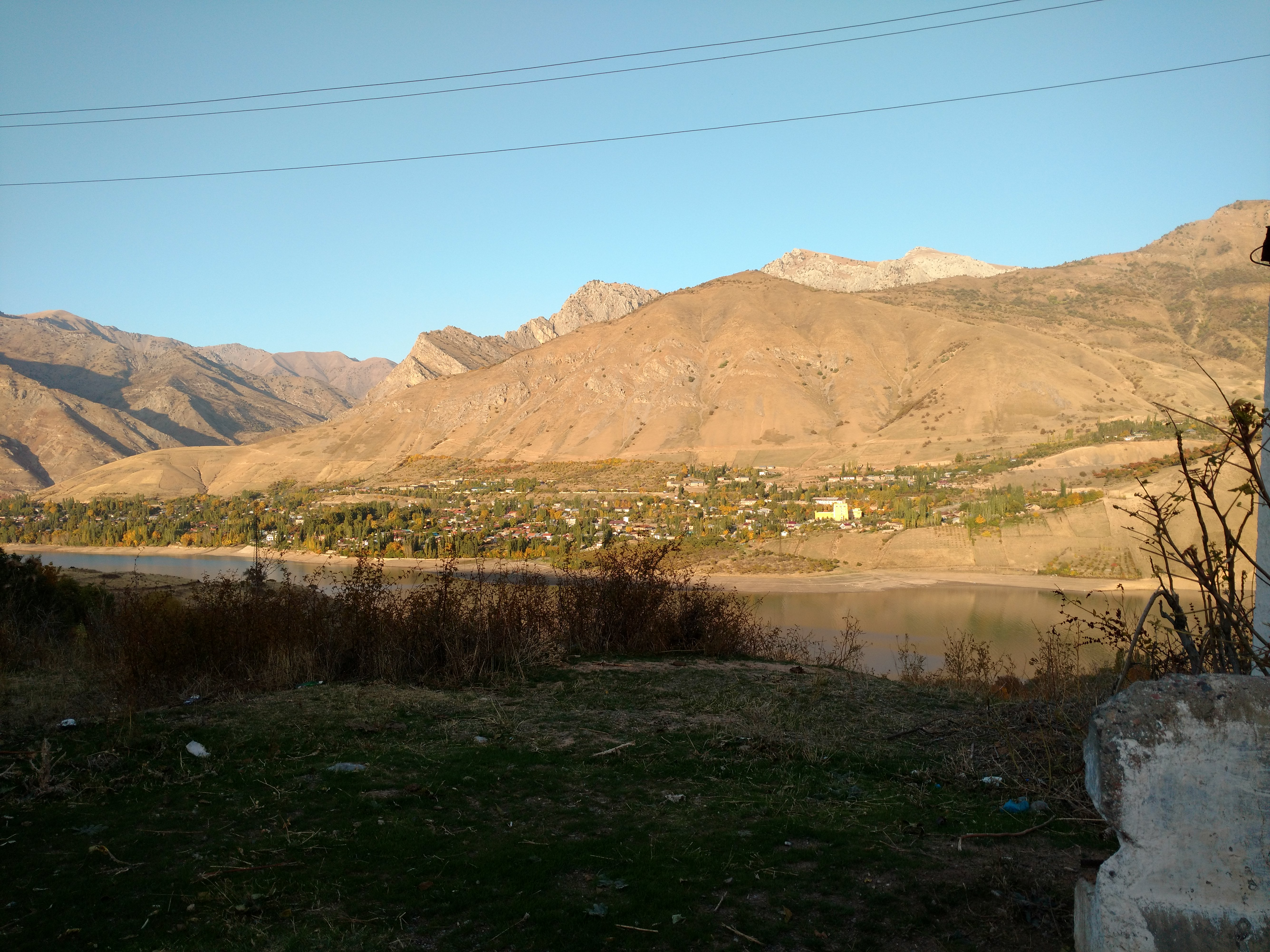 Узбекистан